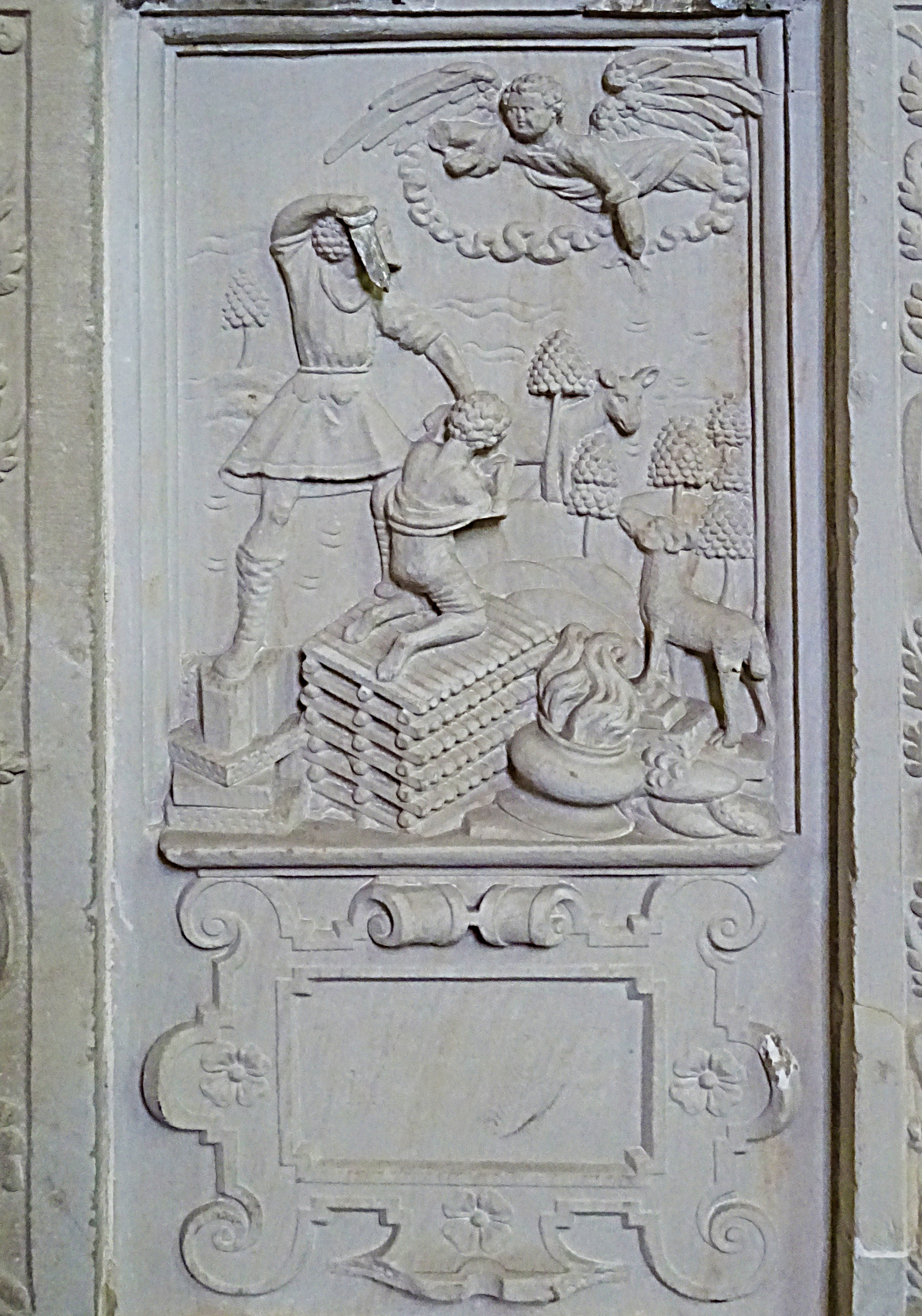 Steinbilderbibel in der St. Annenkirche (Eisleben), 08/29, Opferung Isaaks wird durch einen Engel verhindert